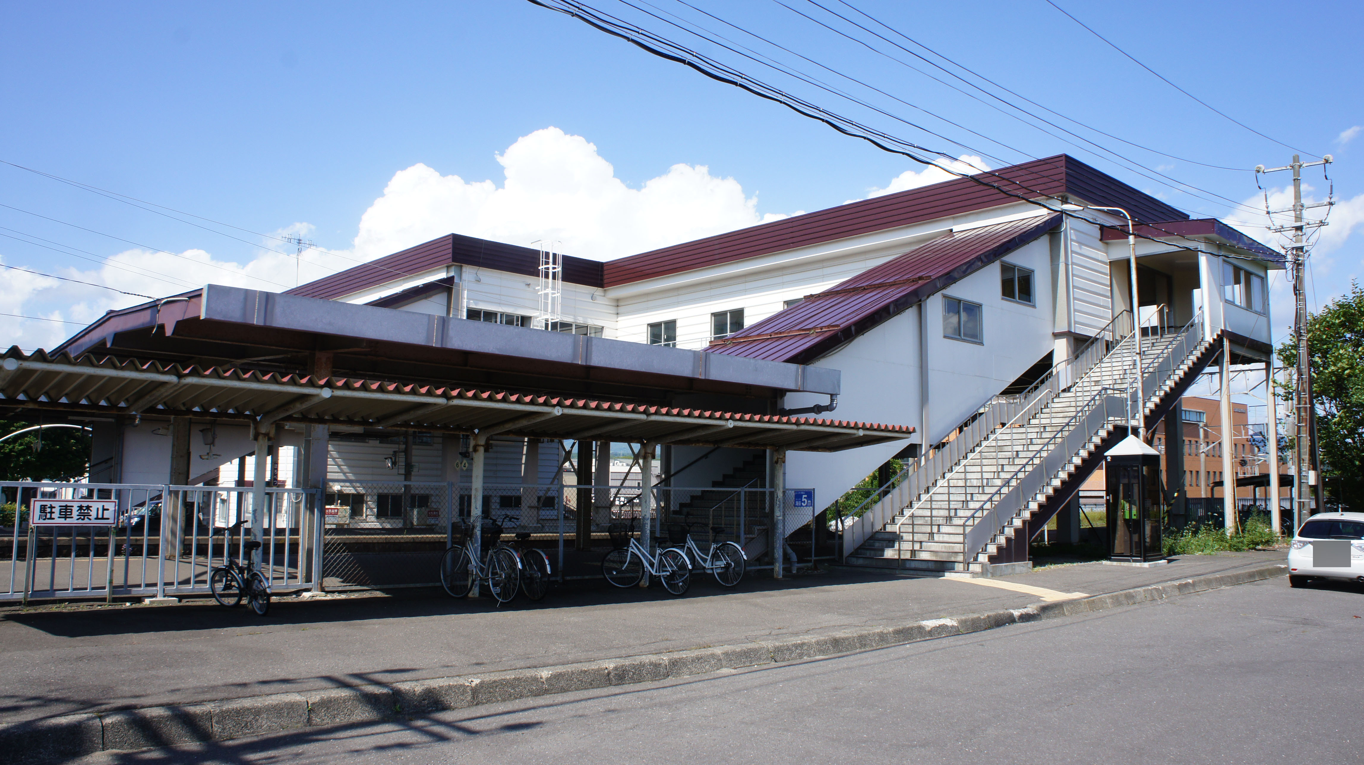 JR室蘭本線・幌別駅東口